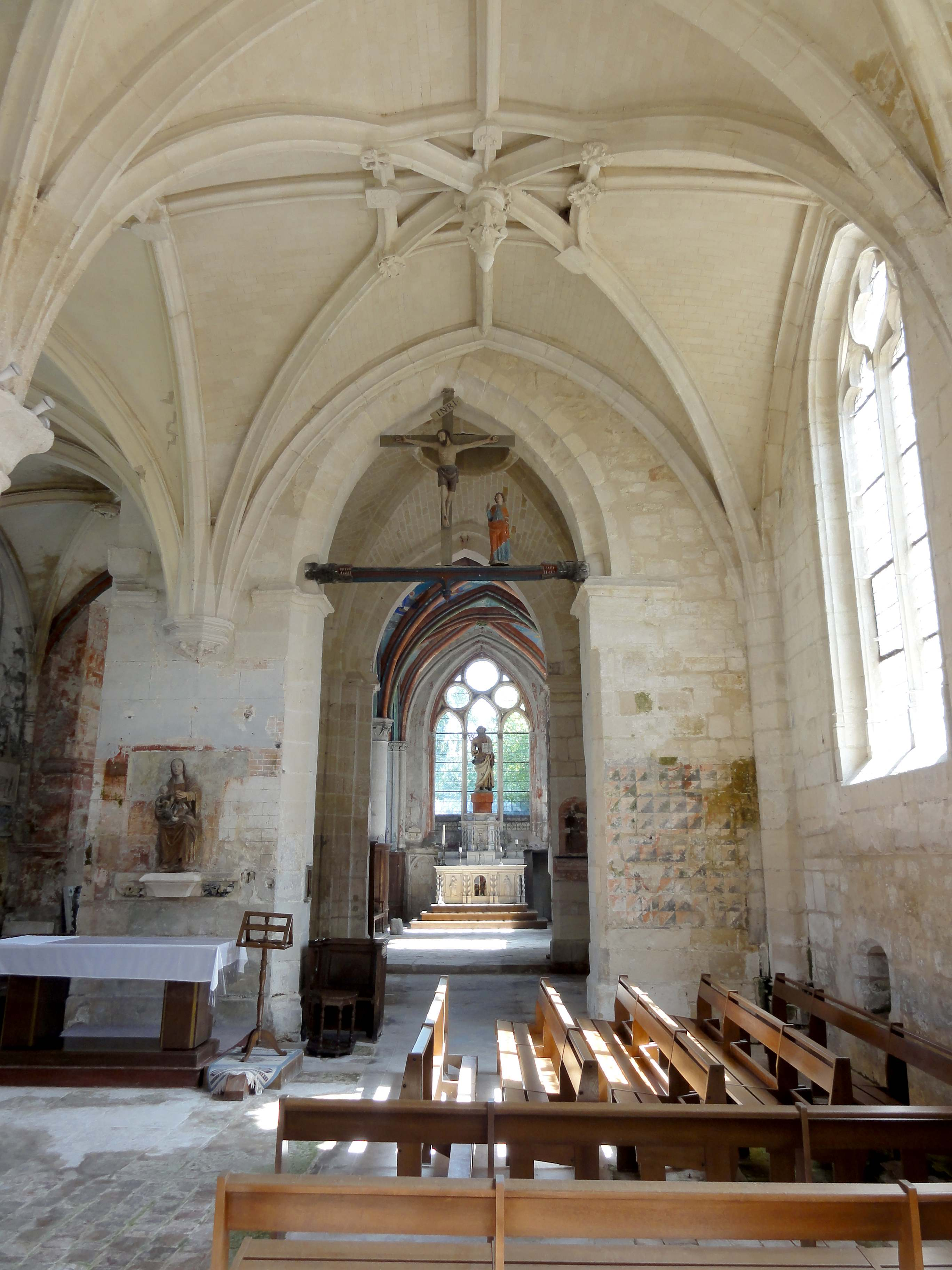 Intérieur de l'église (voir titre).